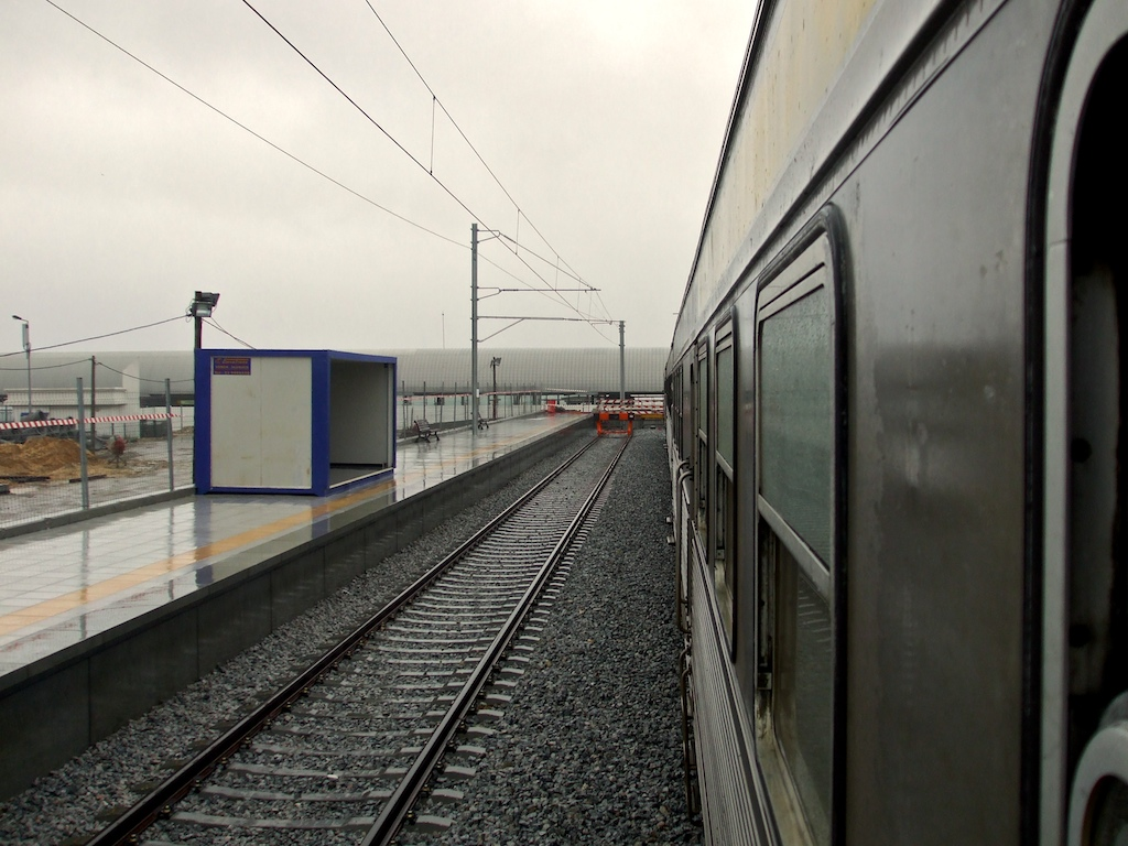 quase pronta, foi inaugurada no dia seguinte. aqui, a bordo do Urbano 17273 [Barreiro - Praias do Sado-A], feito ainda numa UTD. Tipo: EP (Estação) Local: Barreiro [Linha do Alentejo, PK 0,0] Data e hora: 13 de Dezembro de 2008 [13h29]